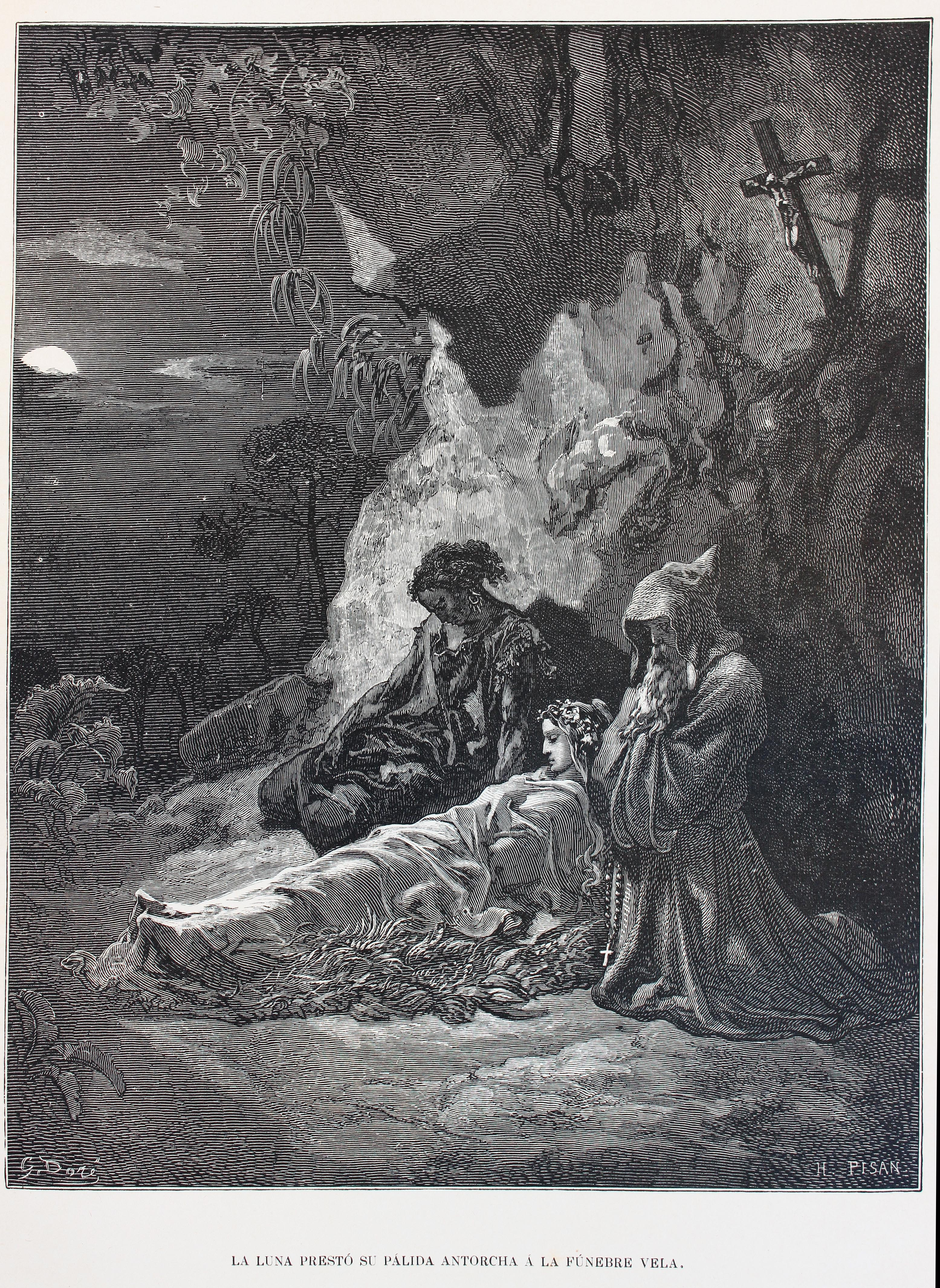 Ilustraciones de la obra : Atala y los Natchez / por Chateaubriand ; versión española por Francisco Nacente ; ilustrada por Gustavo Doré. - Barcelona : Juan Aleu t Fugarull, 1880